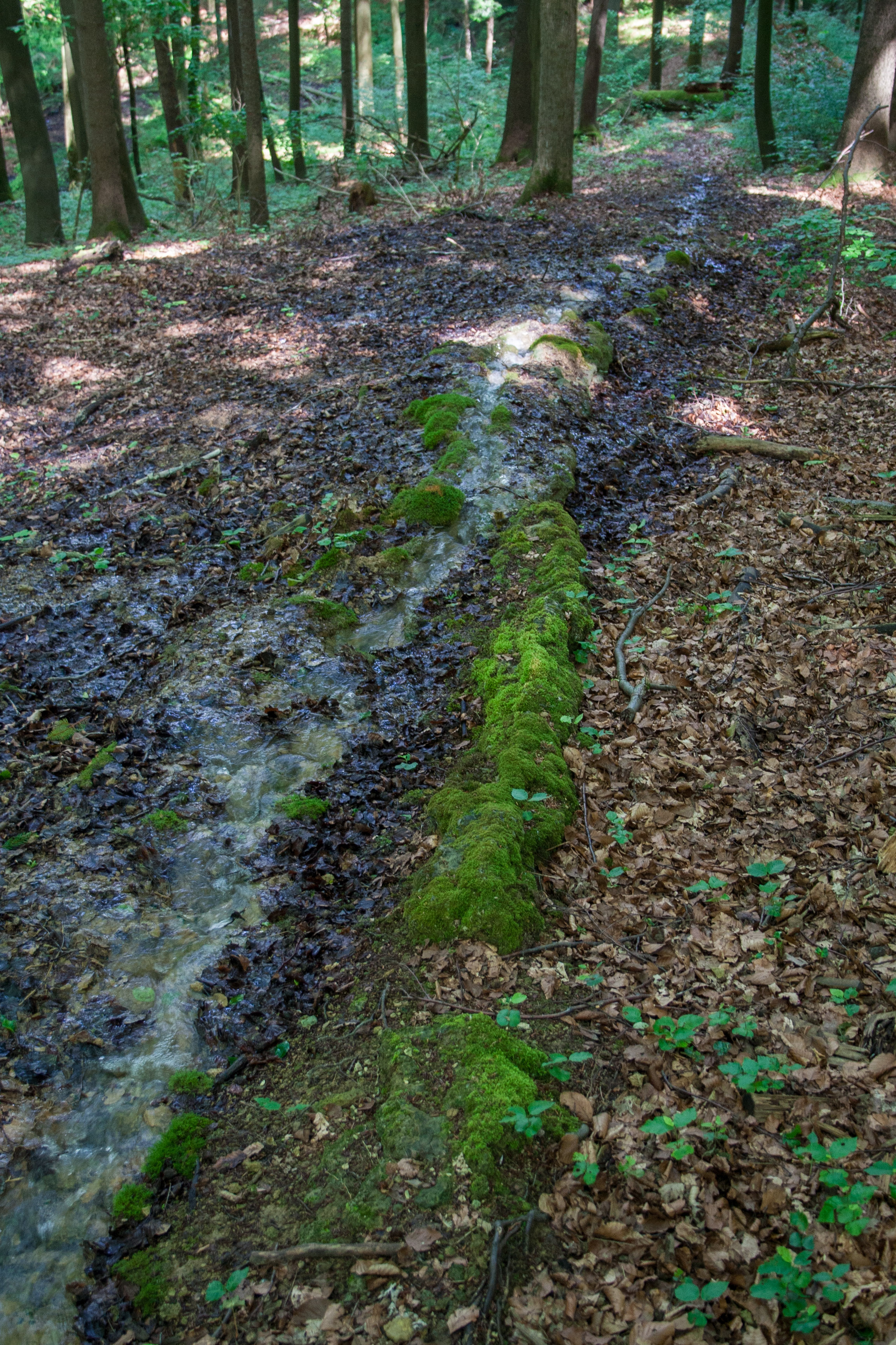 Steinerne Rinne, Buchenberg, Engelthal, Entenberg, Ausweisung des LSG "Südlicher Jura mit Moritzberg und Umgebung"